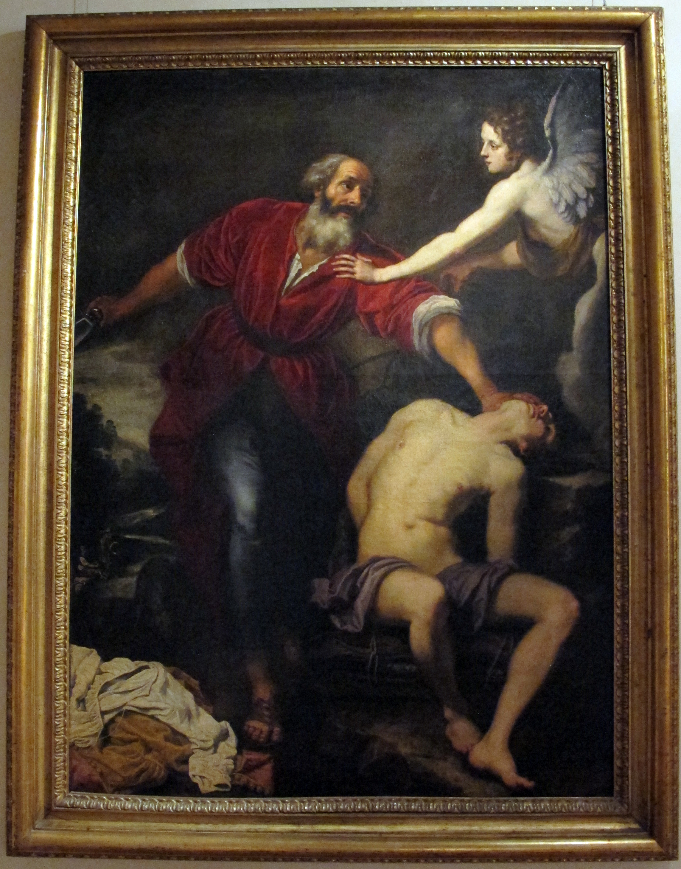 Museo diocesano (San Miniato)